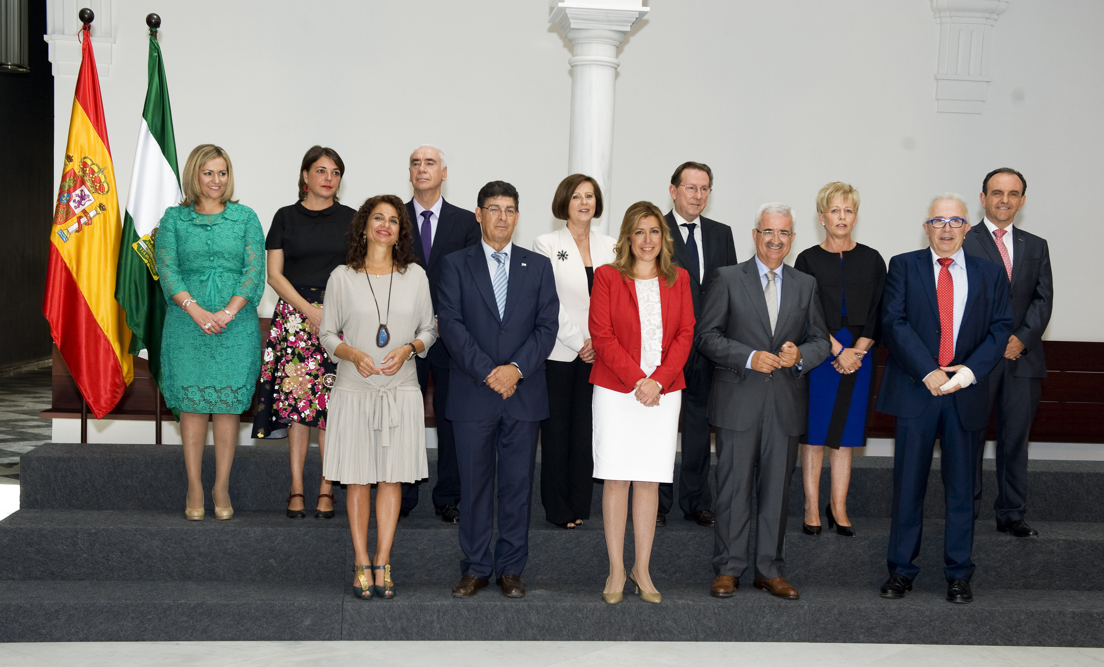 Gobierno Susana Díaz I.